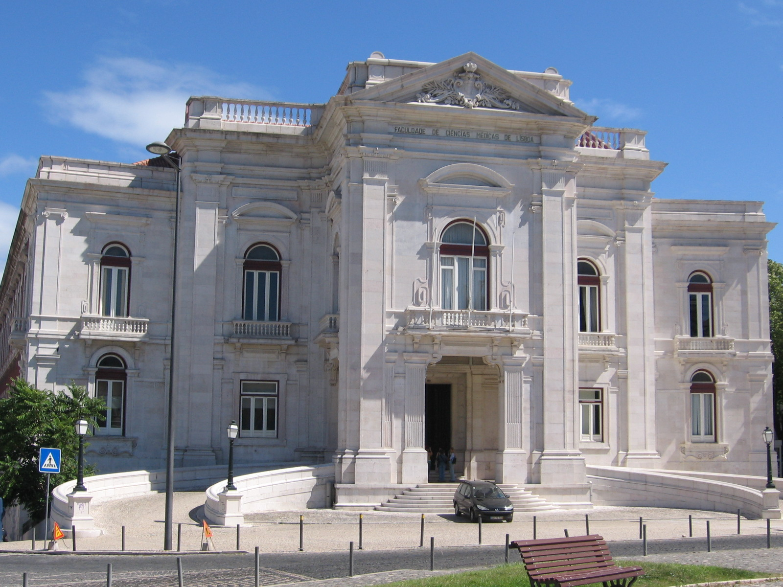 Faculdade de Ciências Médicas da Universidade Nova de Lisboa